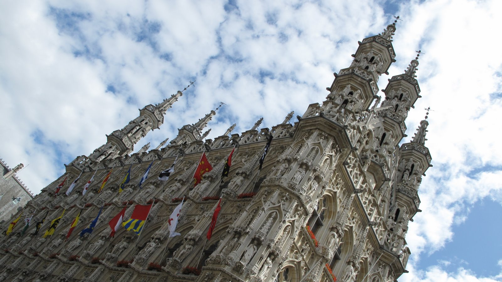 Leuven, Belgium